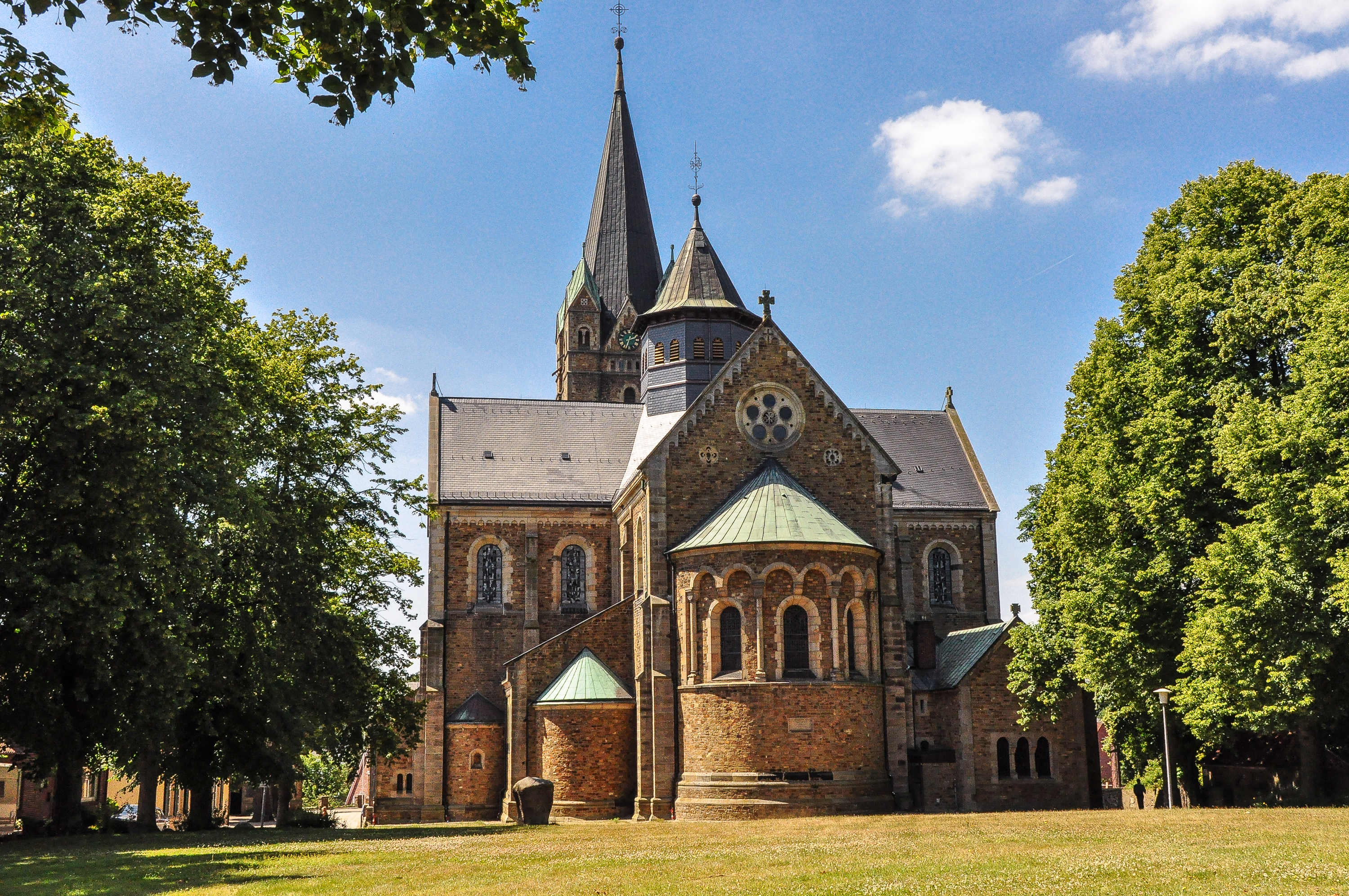 Hier die Ostfassade der römisch-katholische Pfarrkirche St. Nikolaus, im Volksmund Artländer Dom genannt. Sie ist das Wahrzeichen von Ankum, einem alten Marktort, an dem einst vor allem Tuch gehandelt wurde. Die dem heiligen Nikolaus geweihte Kirche liegt auf dem Vogelberg, hoch über den Marktbögen.